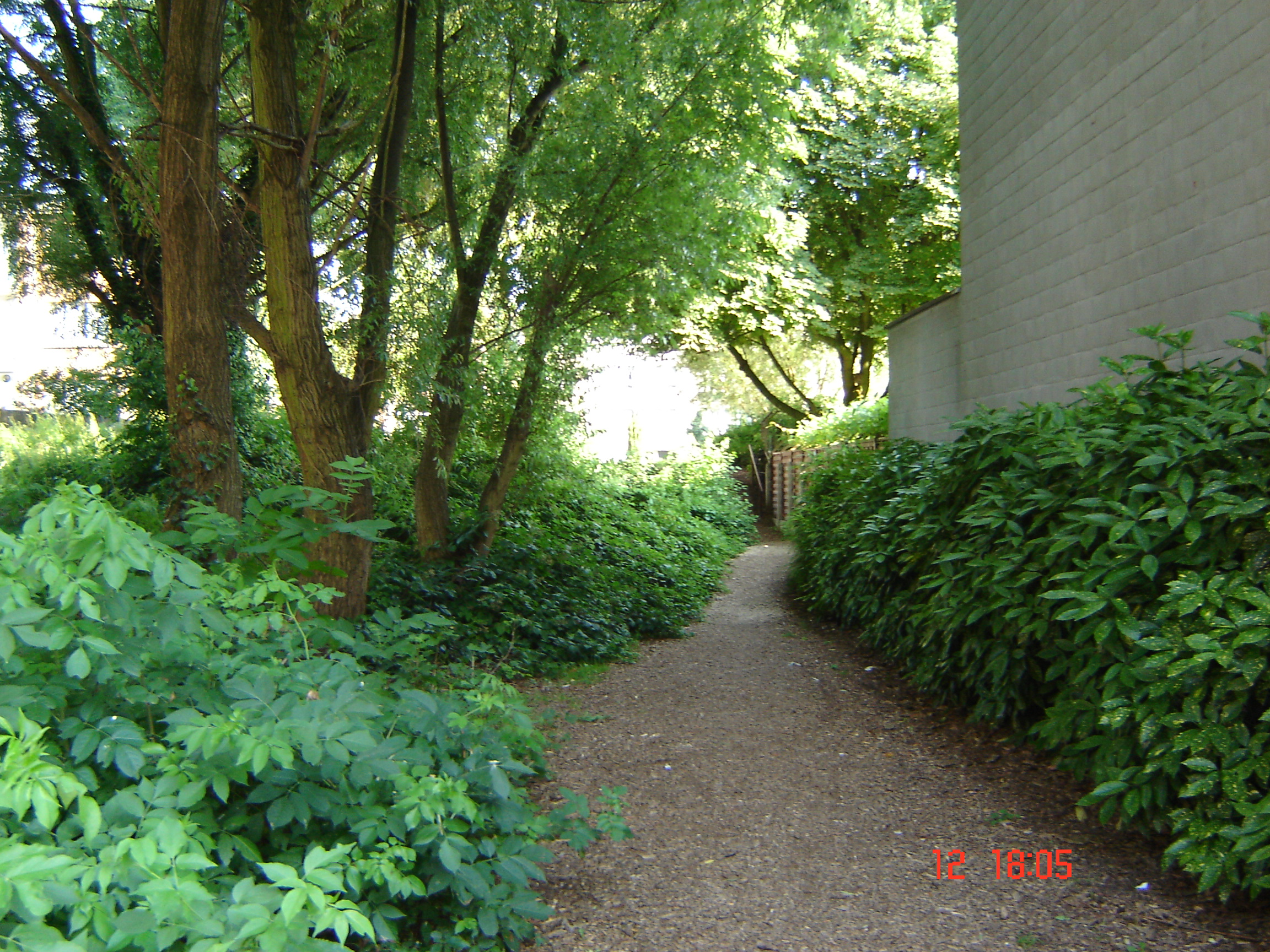 Photographie de Utilisateur:Yevgrav_Zhivago